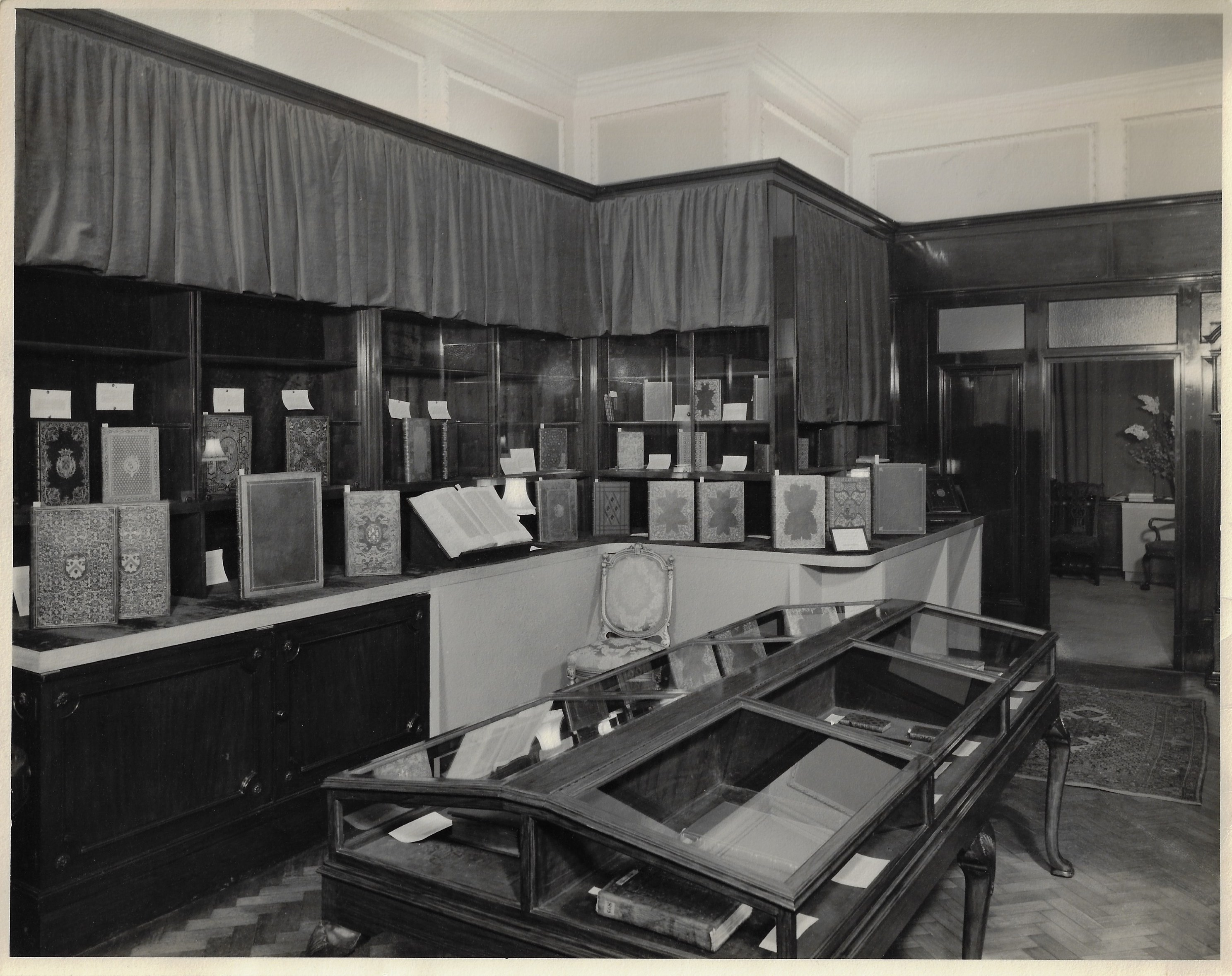 Vue de la librairie Pierre Berès, 14 avenue de Friedland à Paris.